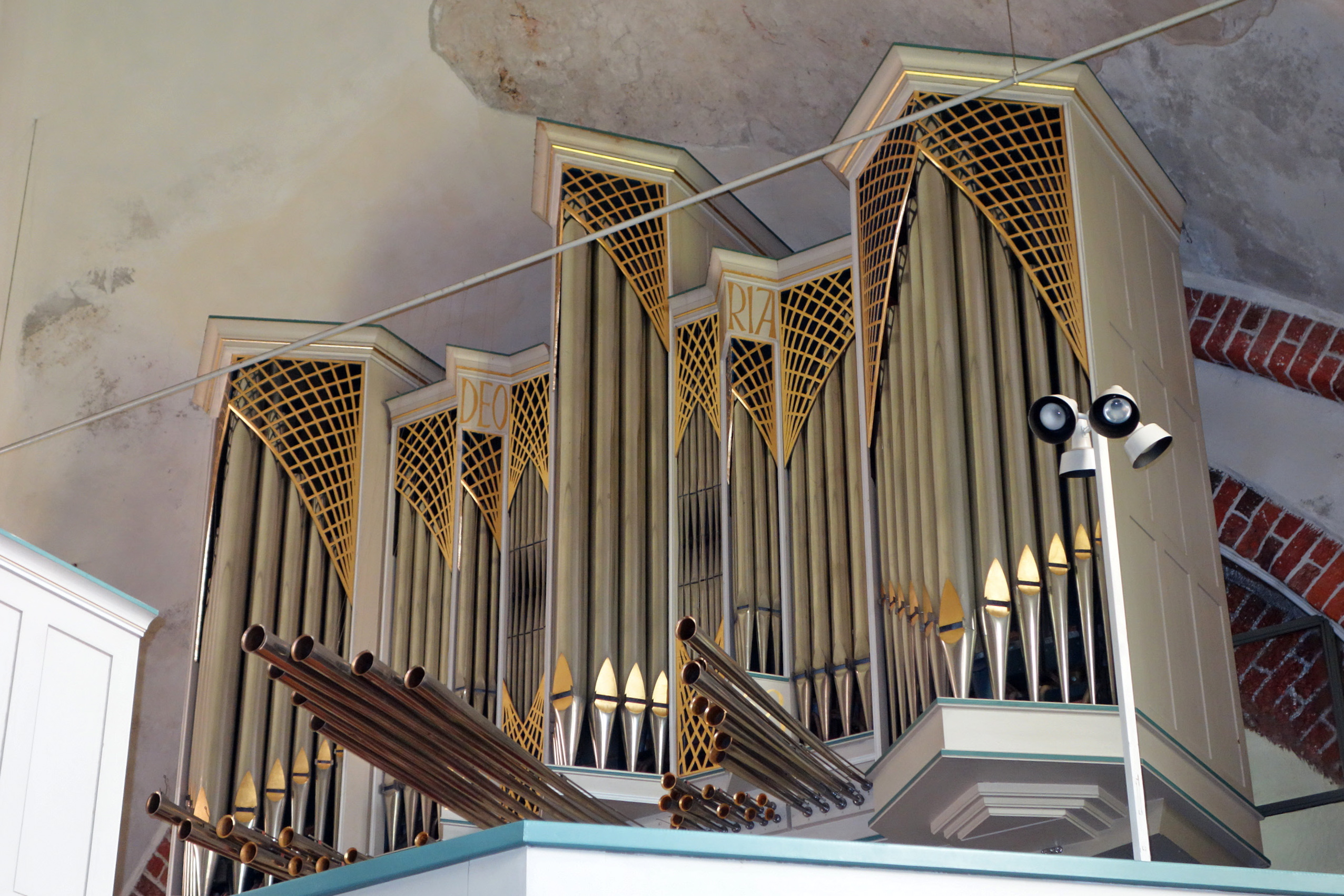 Orgel der St.-Michaeliskirche, Lütjenburg, Schleswig-Holstein